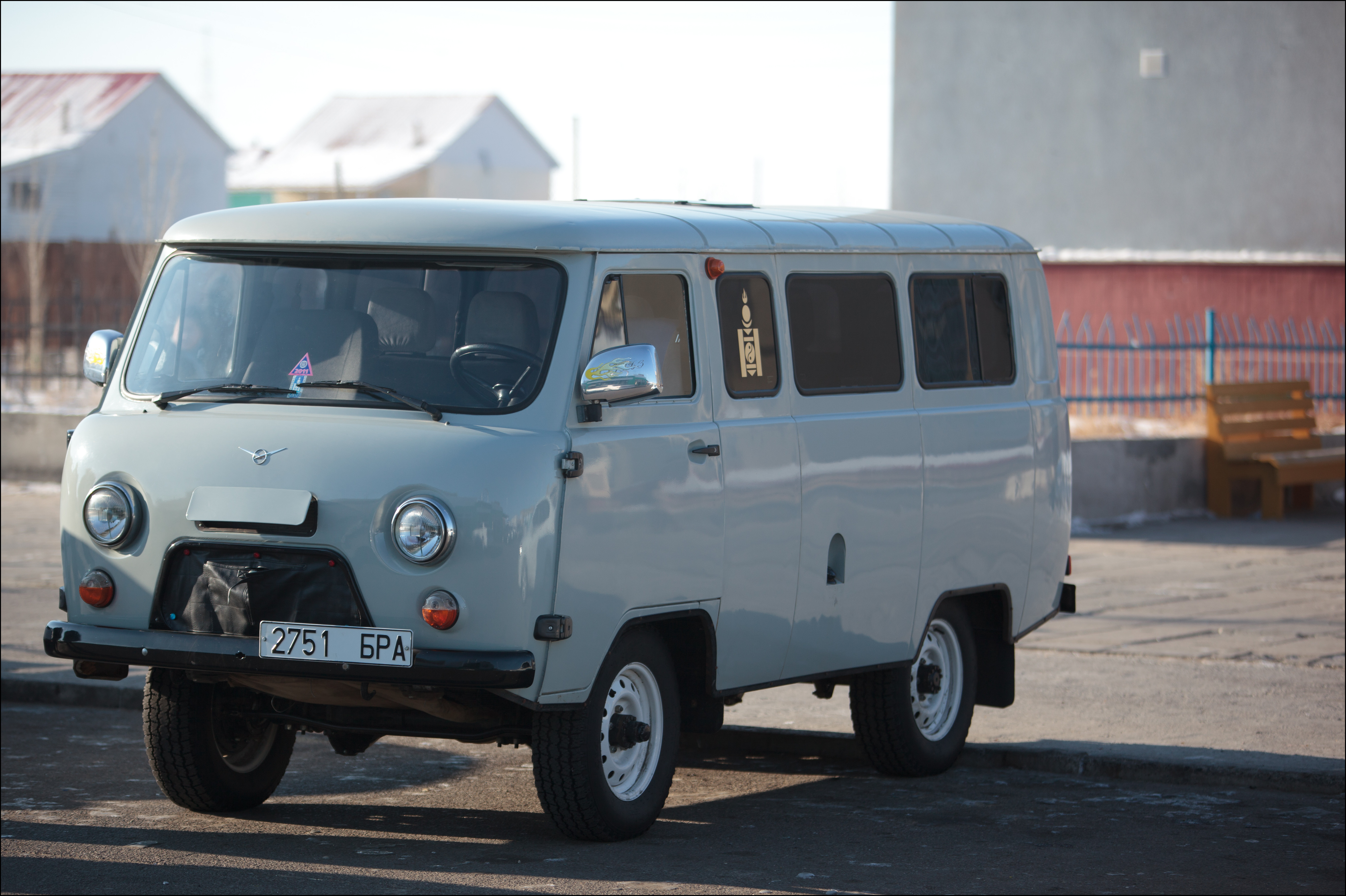 UAZ, Ulyanovsky Avtomobilny Zavod (russe: Ульяновский автомобильный завод, УАЗ) est un fabricant d'automobile russe basé dans la ville d'Oulianovsk, d'où son nom. UAZ est spécialisé dans la fabrications de tout-terrain, de SUV, d'utilitaires légers et de camionnettes. Il est considéré comme le 3e membre du Big Three russe, loin derrière AvtoVAZ, et après GAZ.